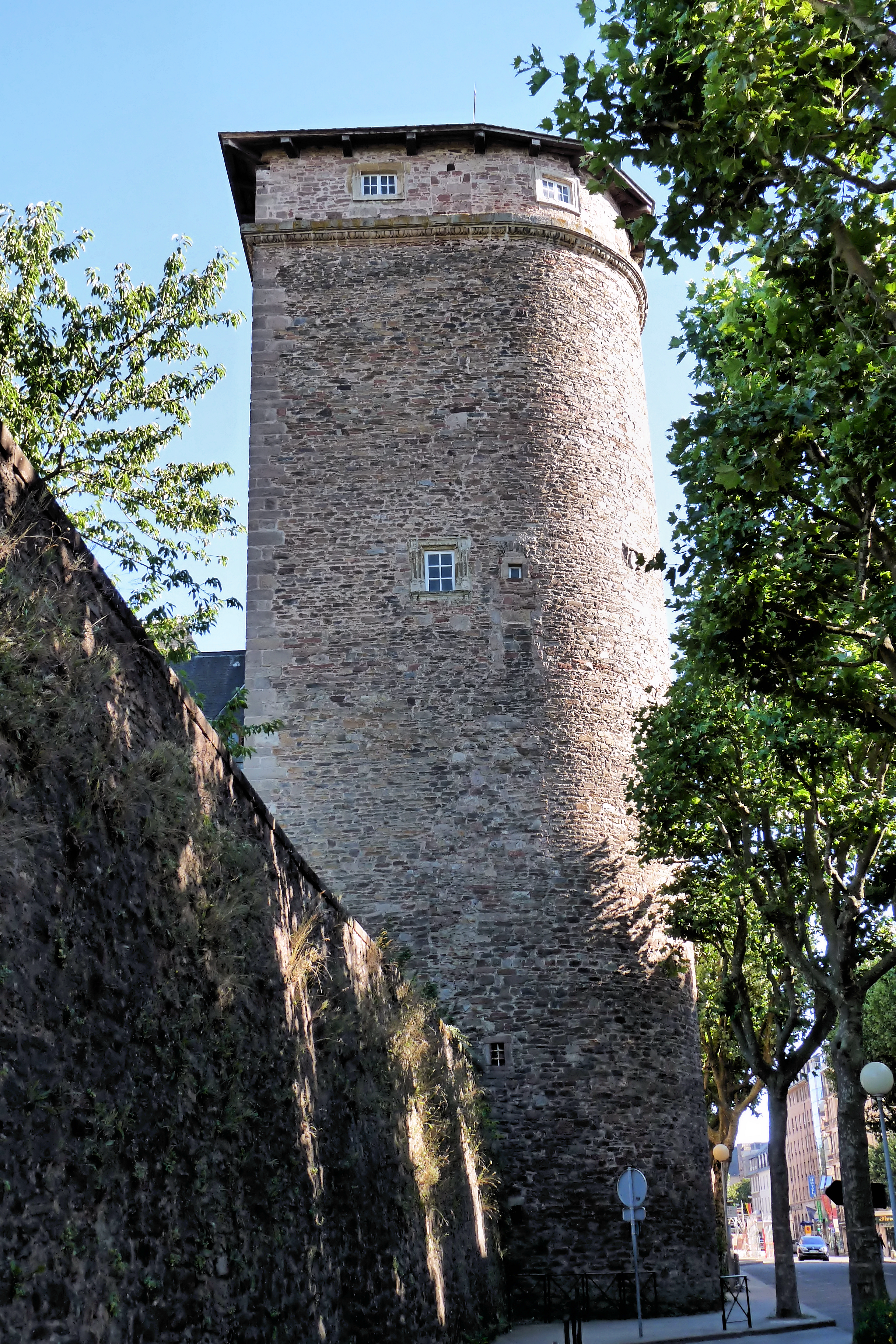 Rodez: La tour des Corbières (XVème siècle), incluse dans les remparts, à deux pas de la cathédrale